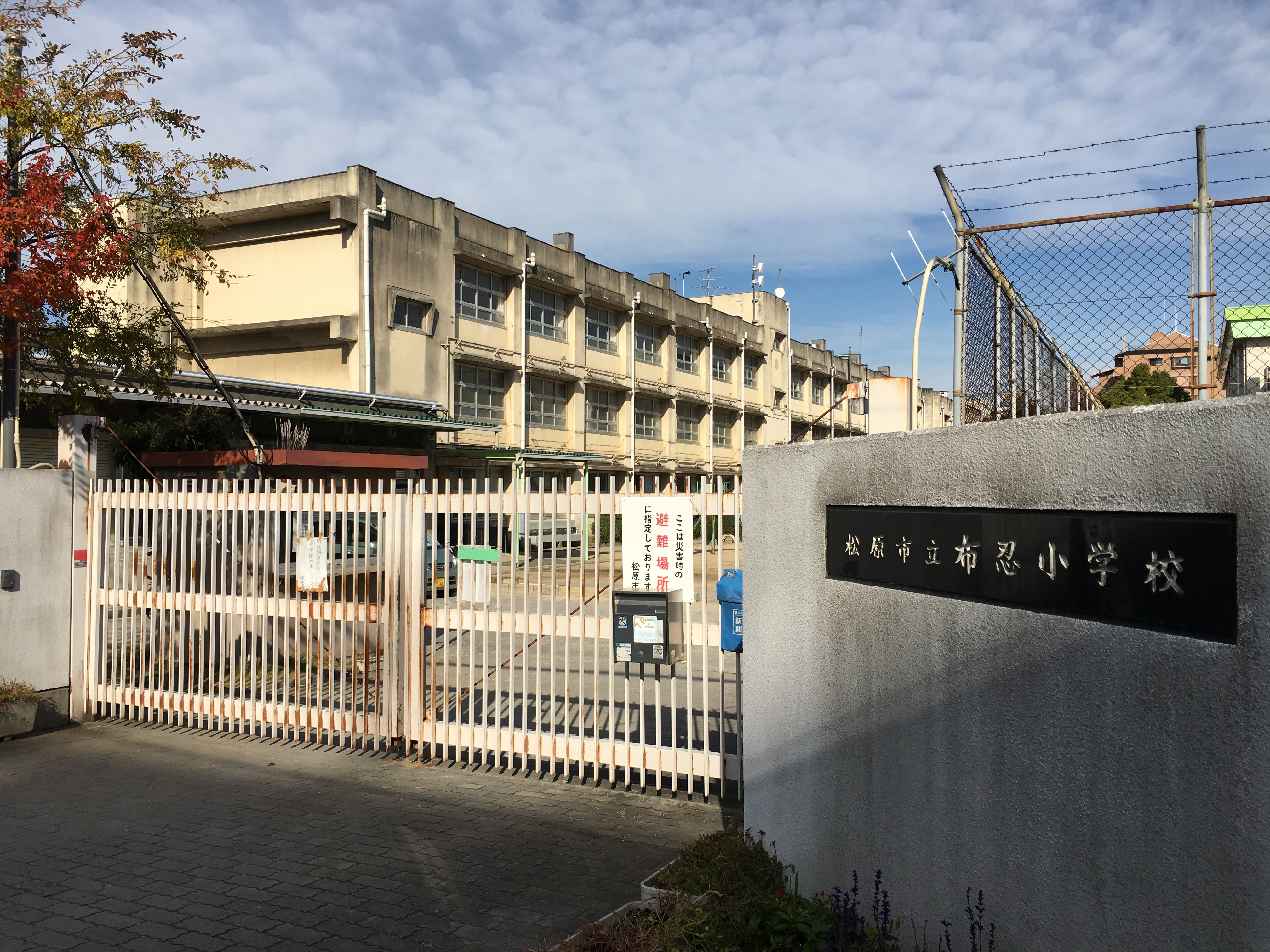 松原市立布忍小学校